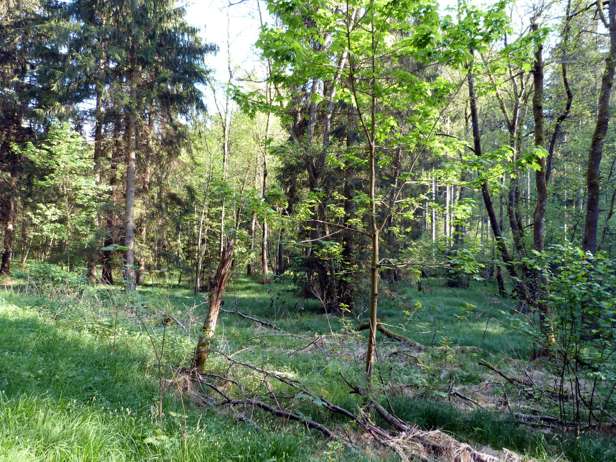 (LSG:BW-1.36.029)_Keuerstadt und Umgebung, Seitental